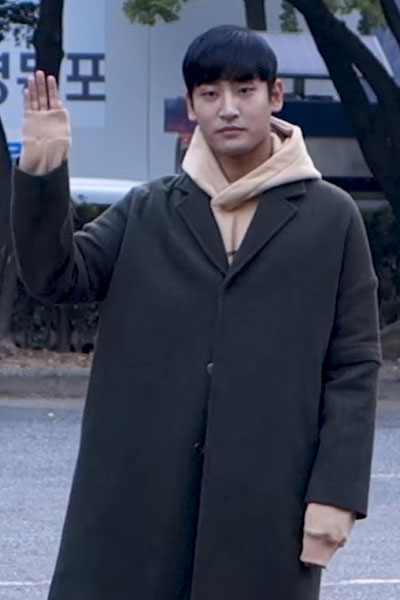 171027 KBS 뮤직뱅크 출근길